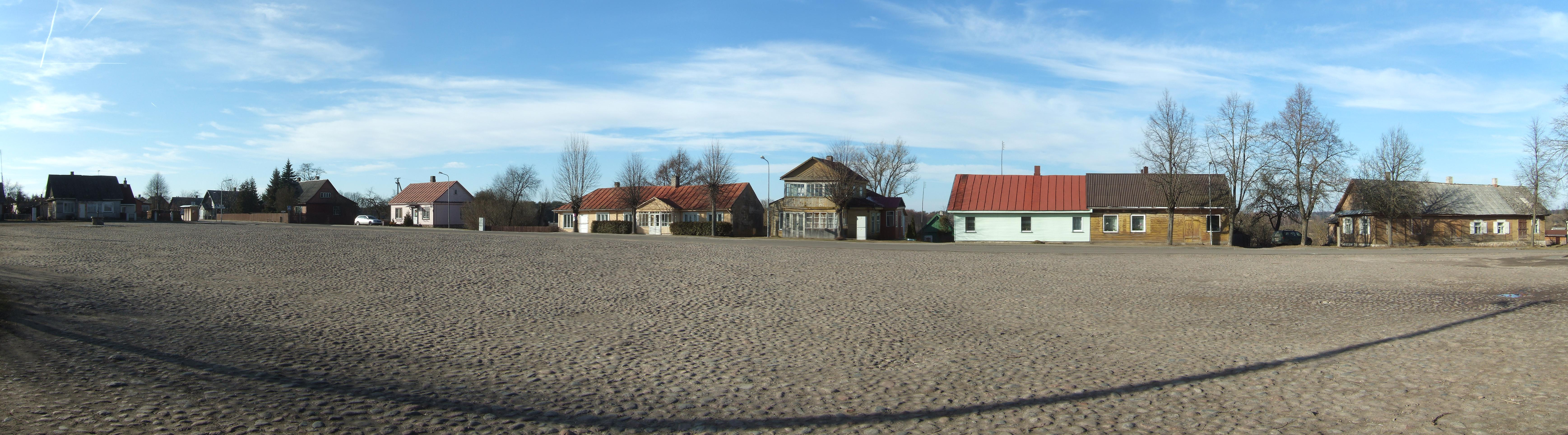 Centrinė Onuškio miestelio aikštė.